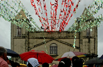 Polo Church, Valenzuela City